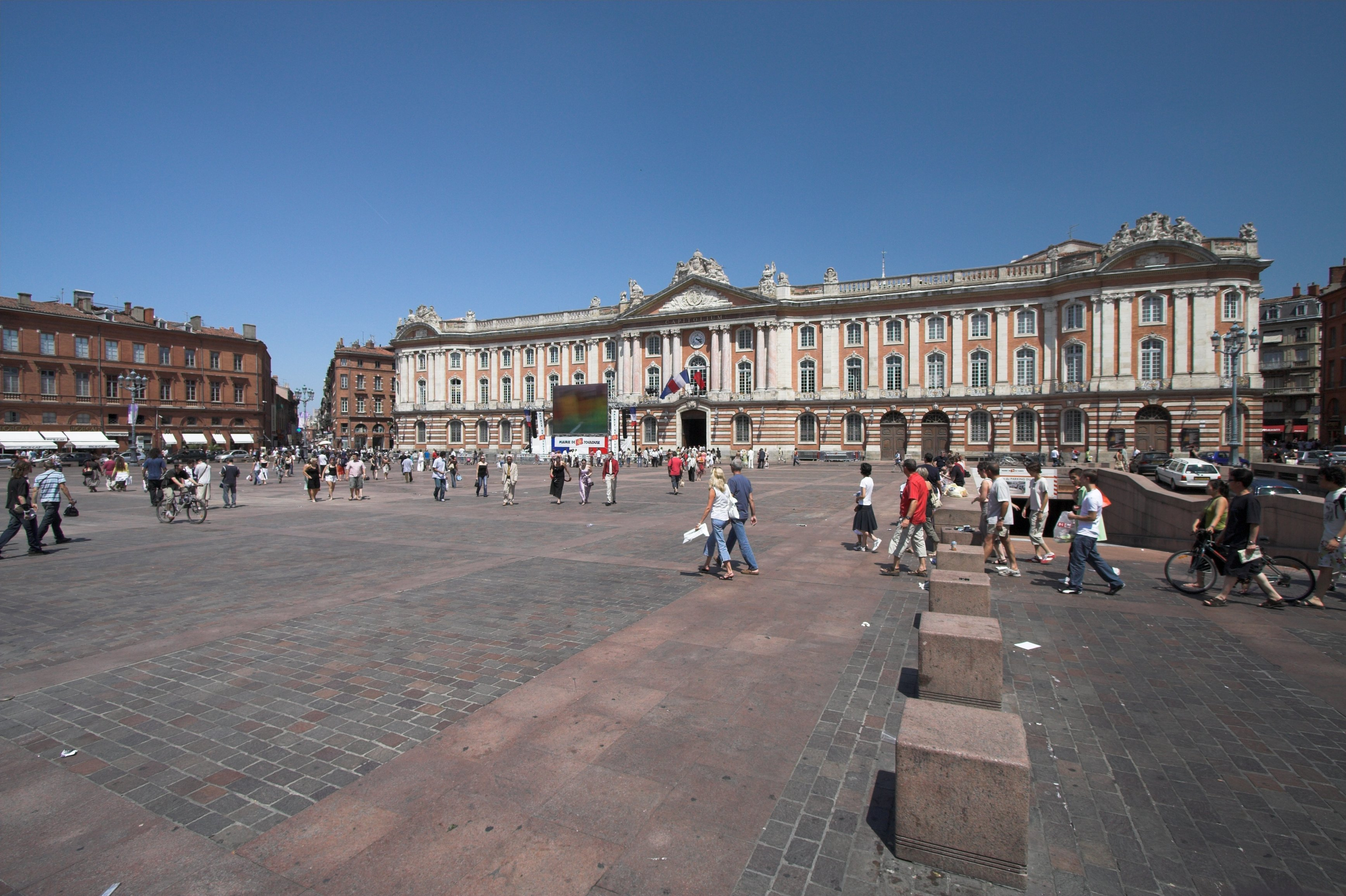 Place du capitole(Toulouse, France)